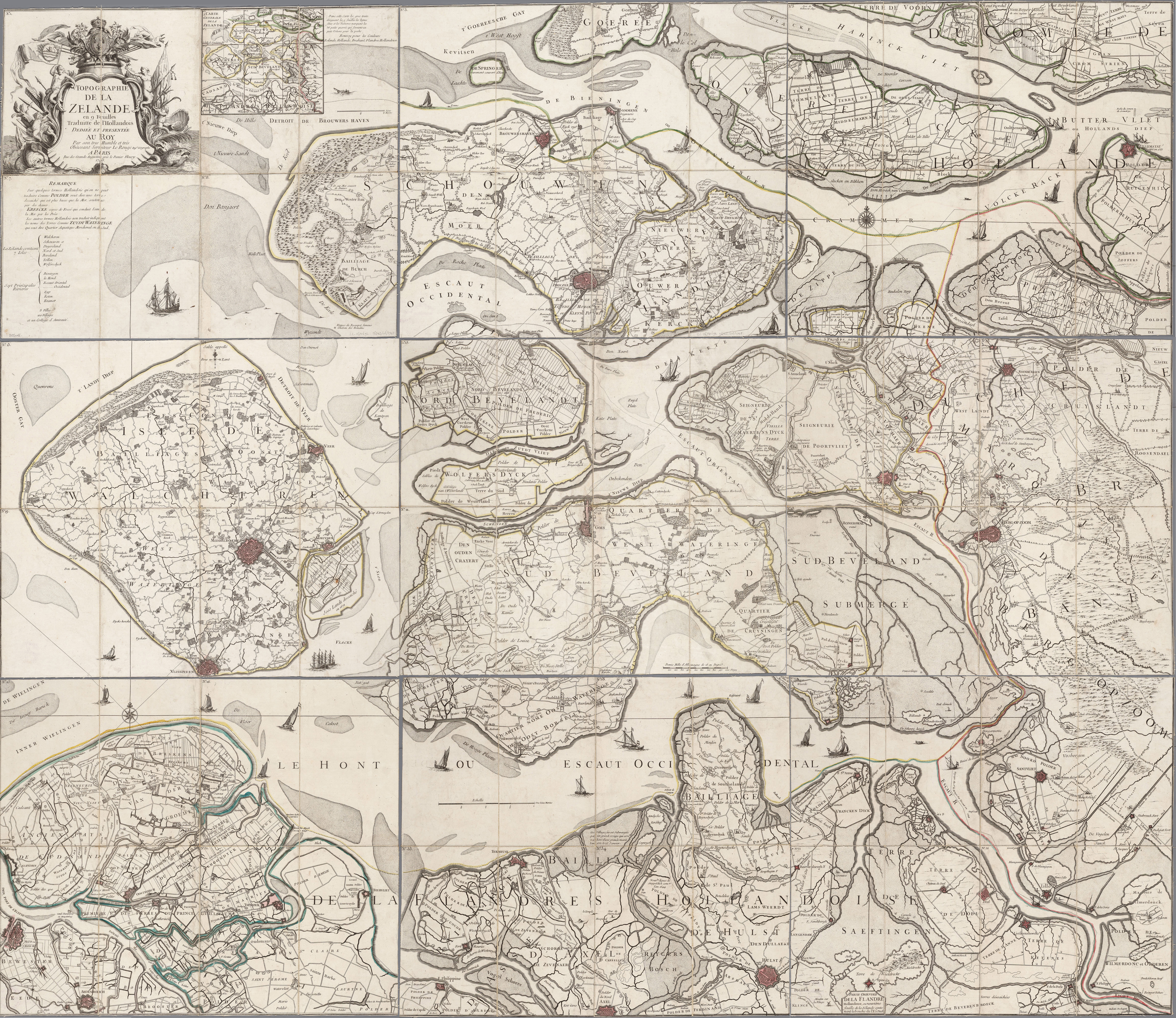 9 bladige kaart van de provincie Zeeland (totaal: 138 x 165 cm)